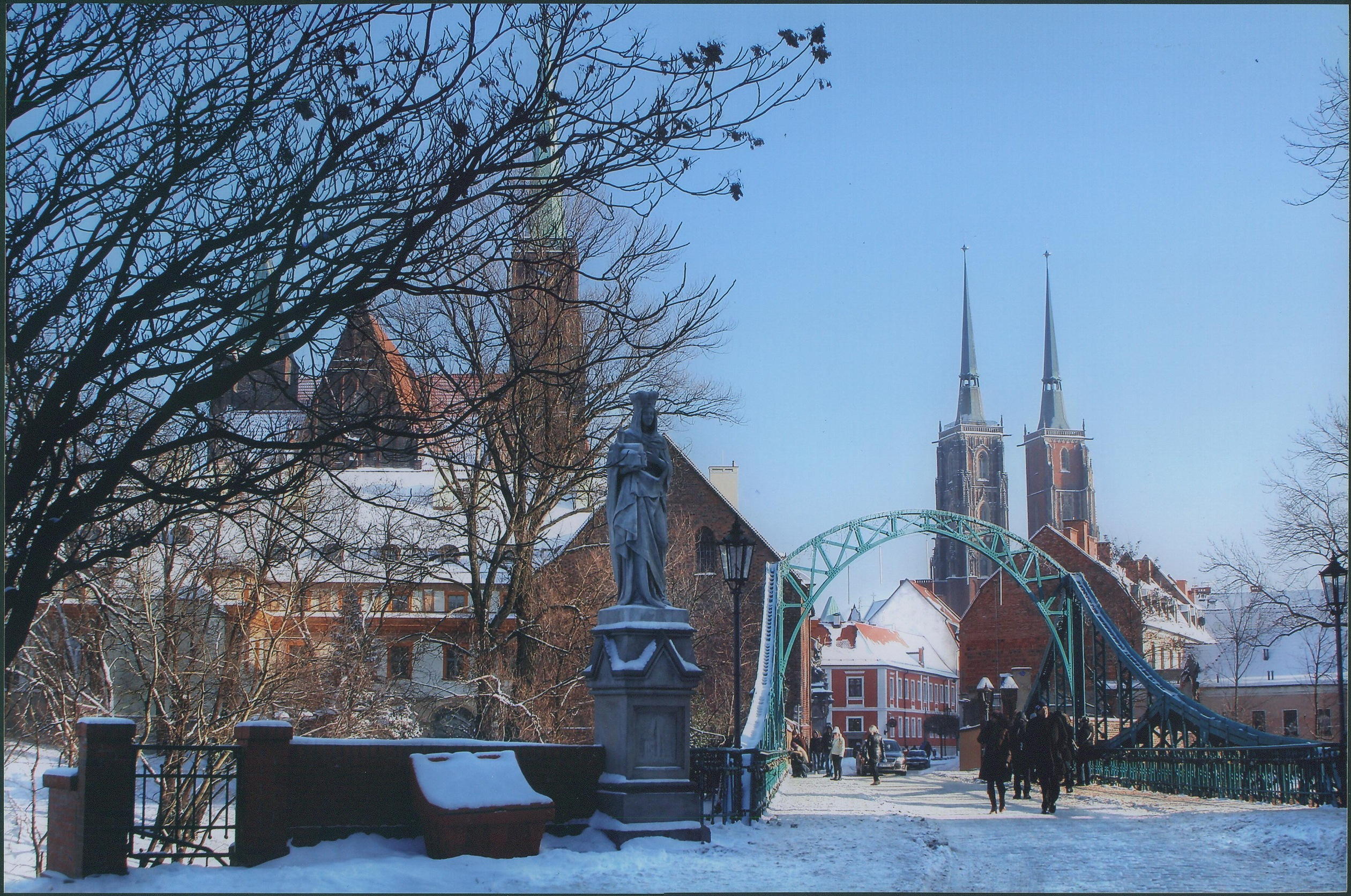 WrocławMost Tumski, w głębi dwie wieże archikatedry wrocławskiej, po lewej wieża kościoła św. Krzyża